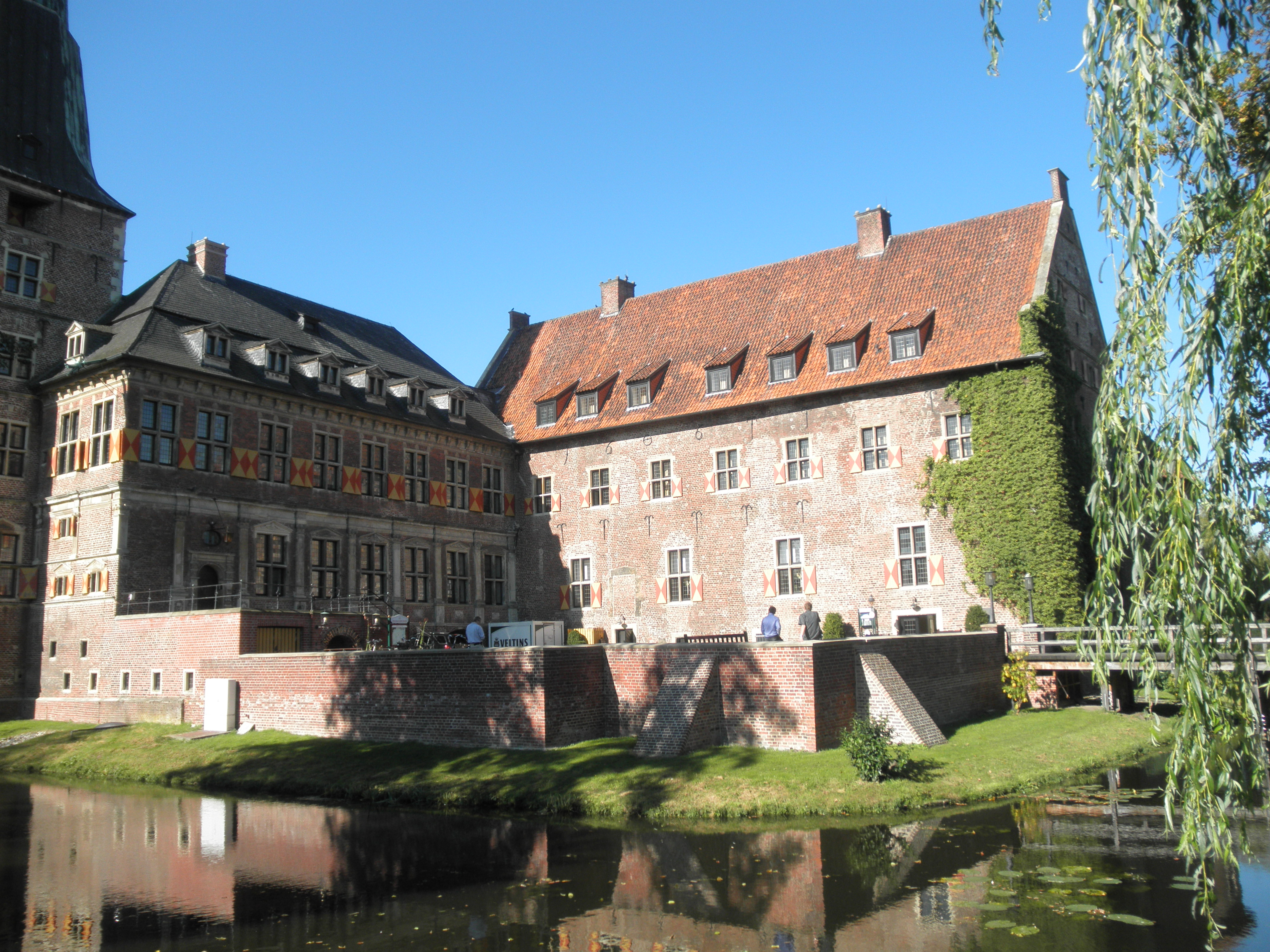 Akvokastelo Raesfeld